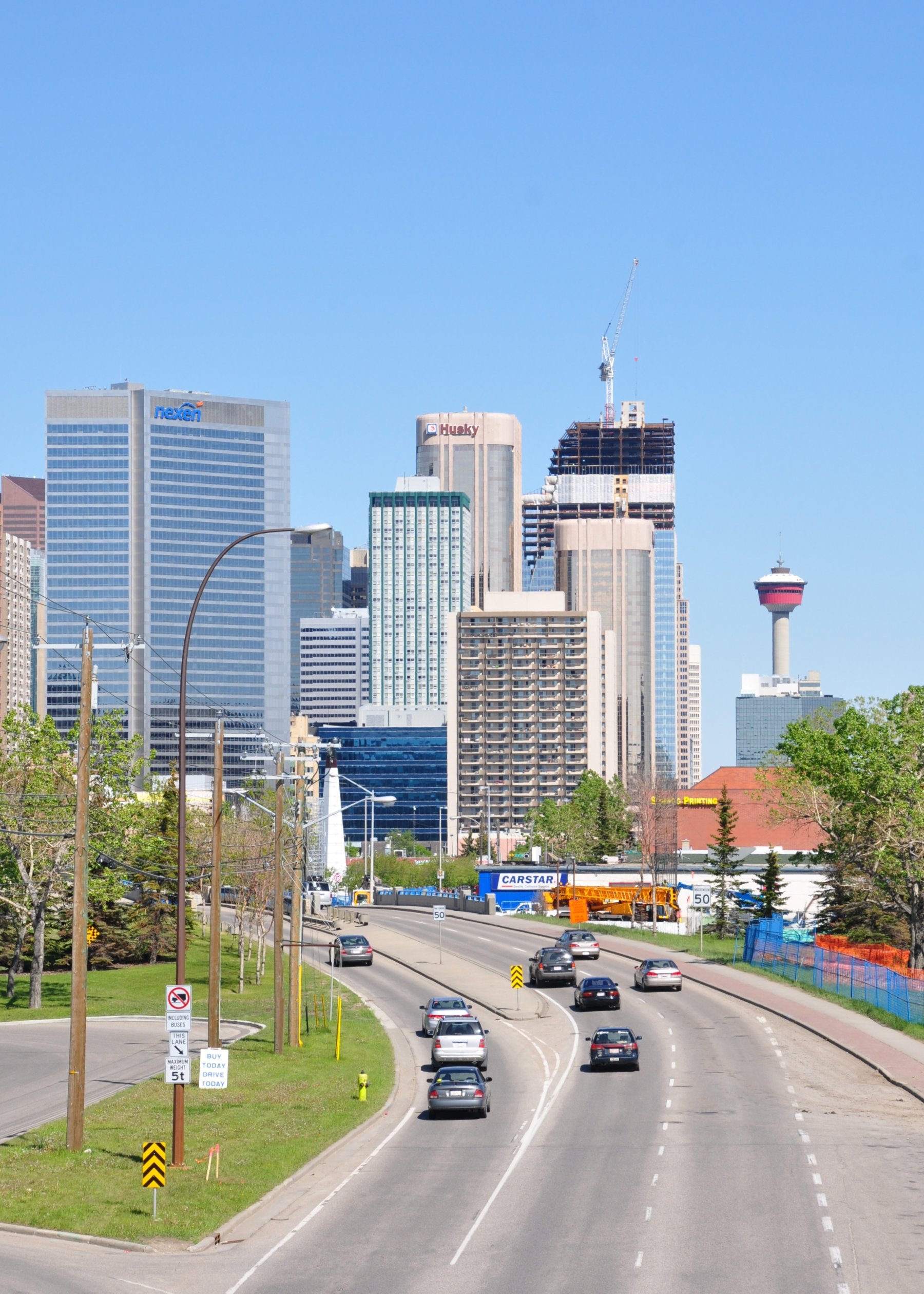 Calgary